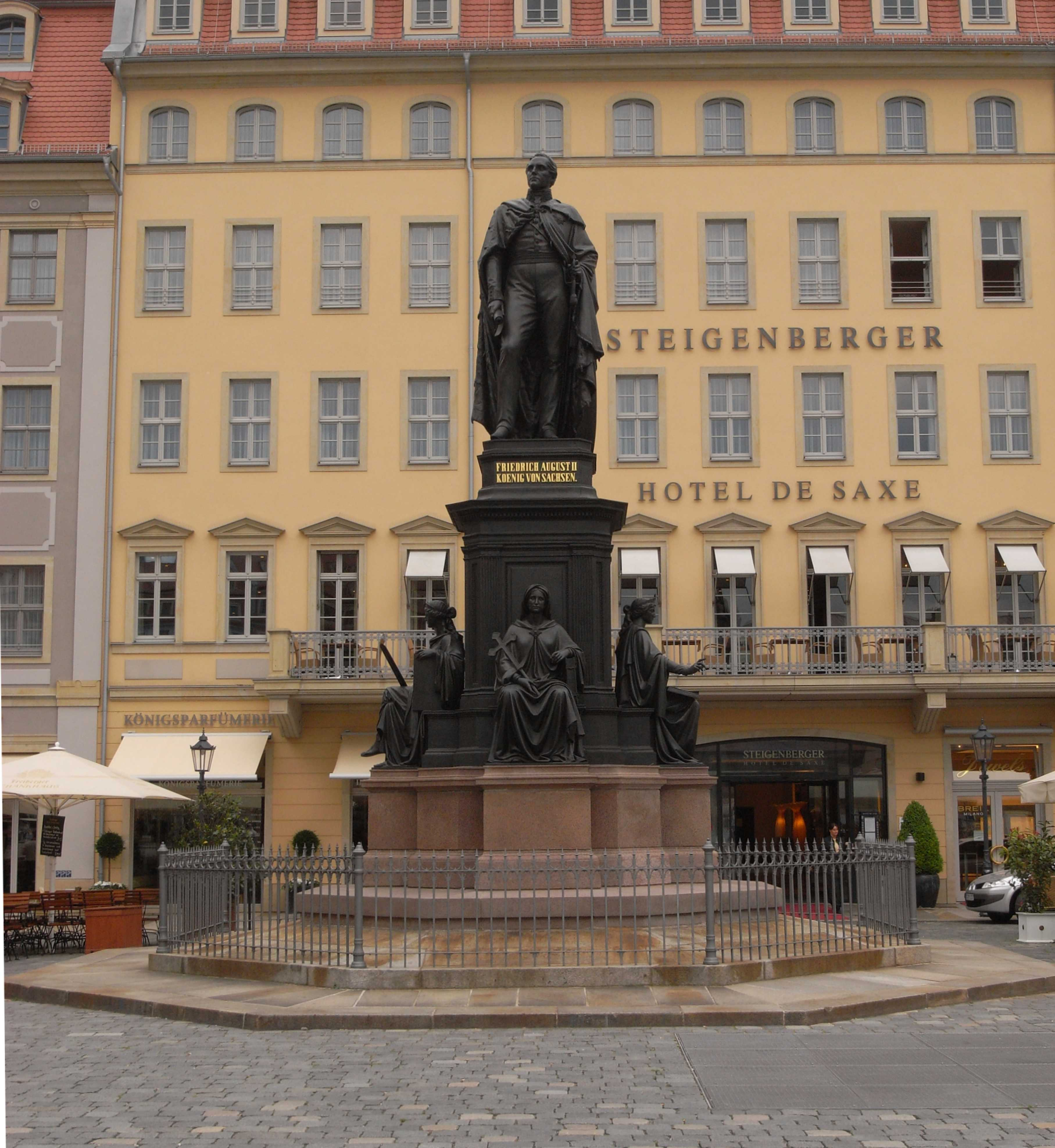 Denkmal von König Friedrich August II. (Gestaltung: 1861-1866 Ernst Julius Hähnel)